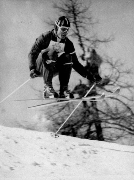 Toni Sailer nella discesa libera di Cortina 1956